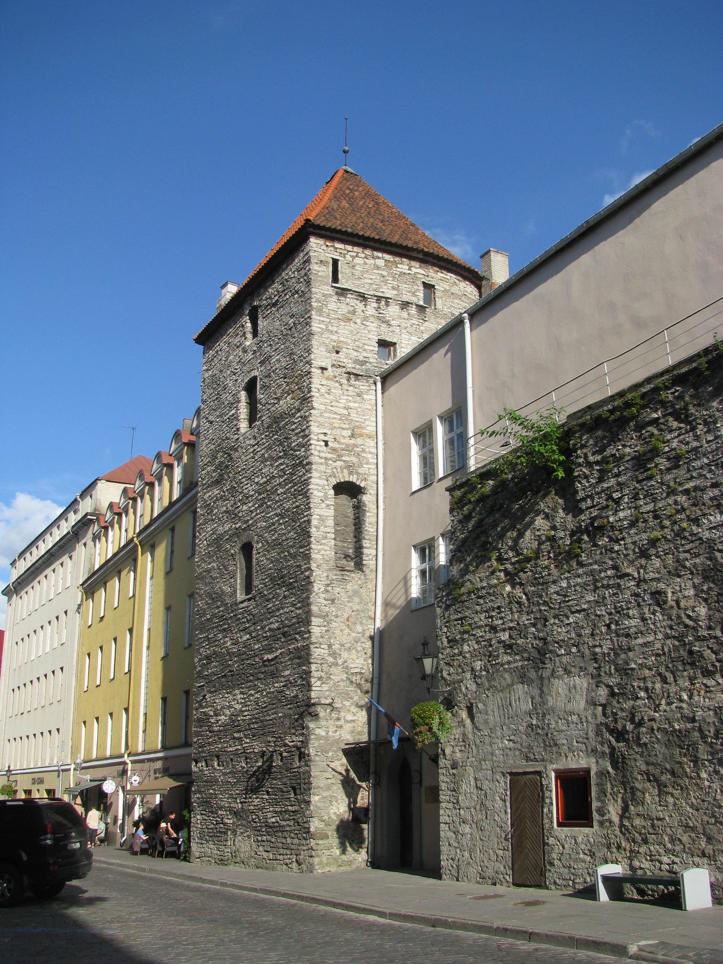 Assauwe torn Myyrivahe tänaval, vaade Harju tänava poolt.